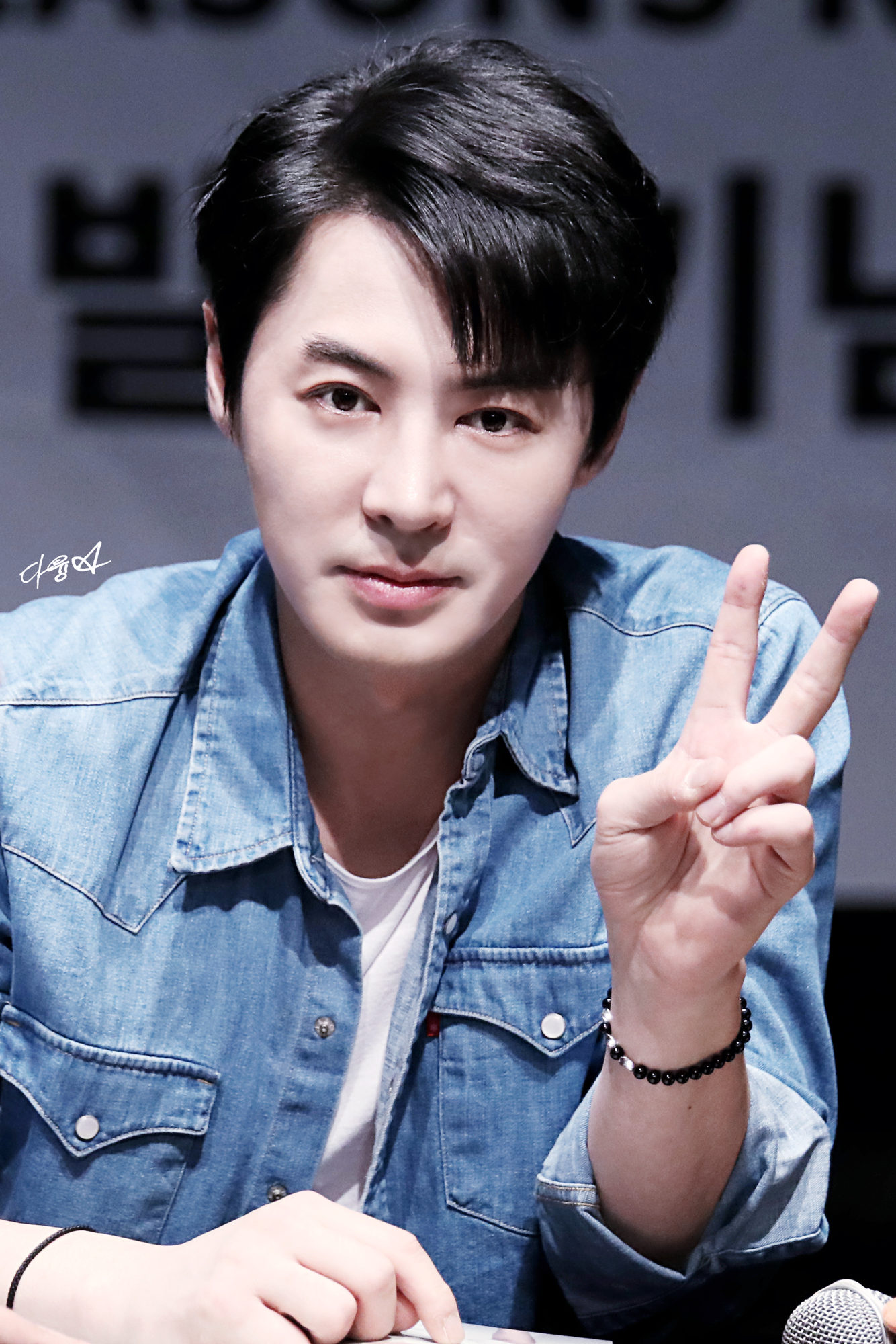 180707 성암아트홀 팬사인회